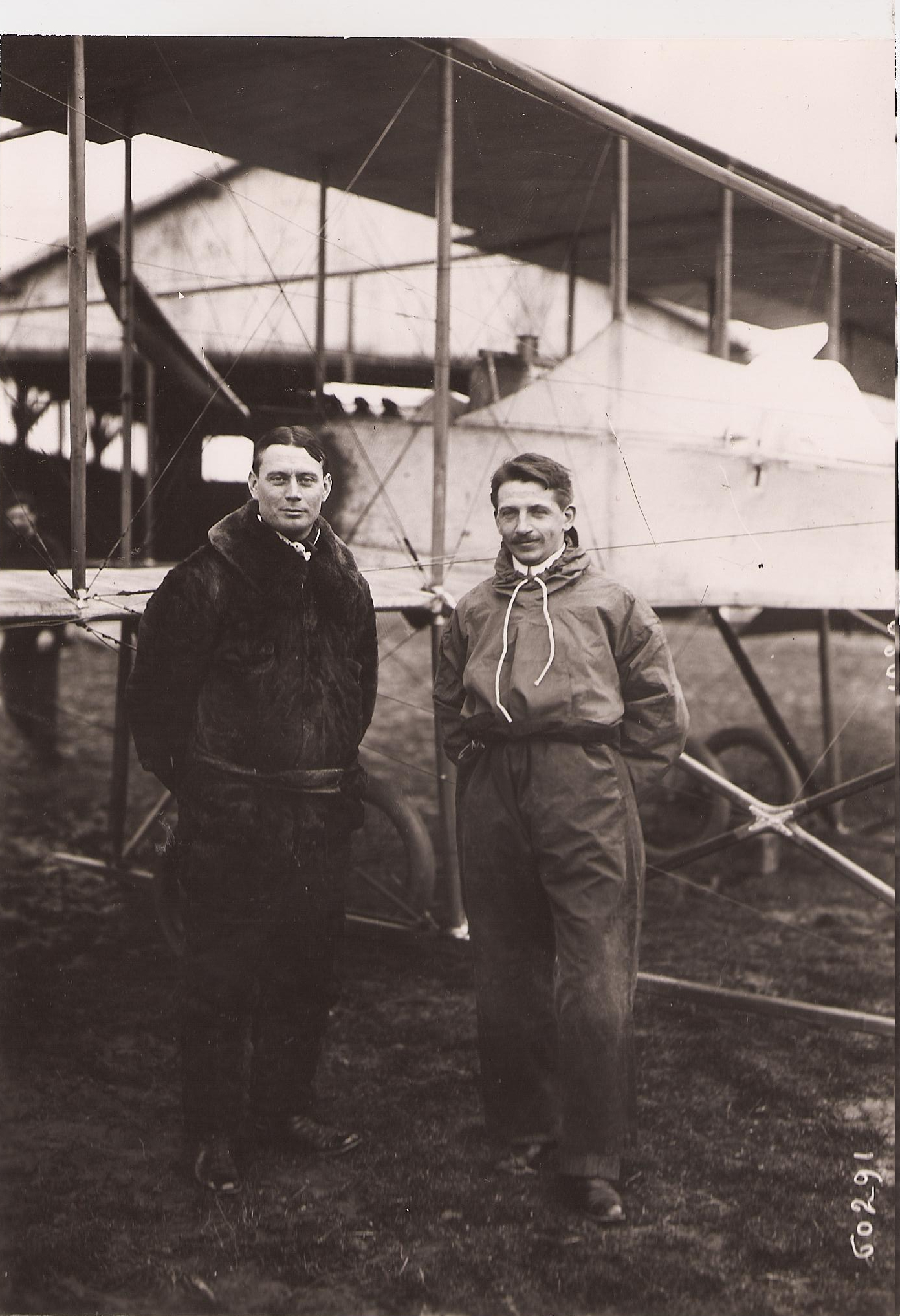 Eugène Renaux et Albert Senoucque au départ du Grand Prix Michelin d'Aviation (dont ils sortiront vainqueurs), le 7 Mars 1911 à Buc, Yvelines, France.